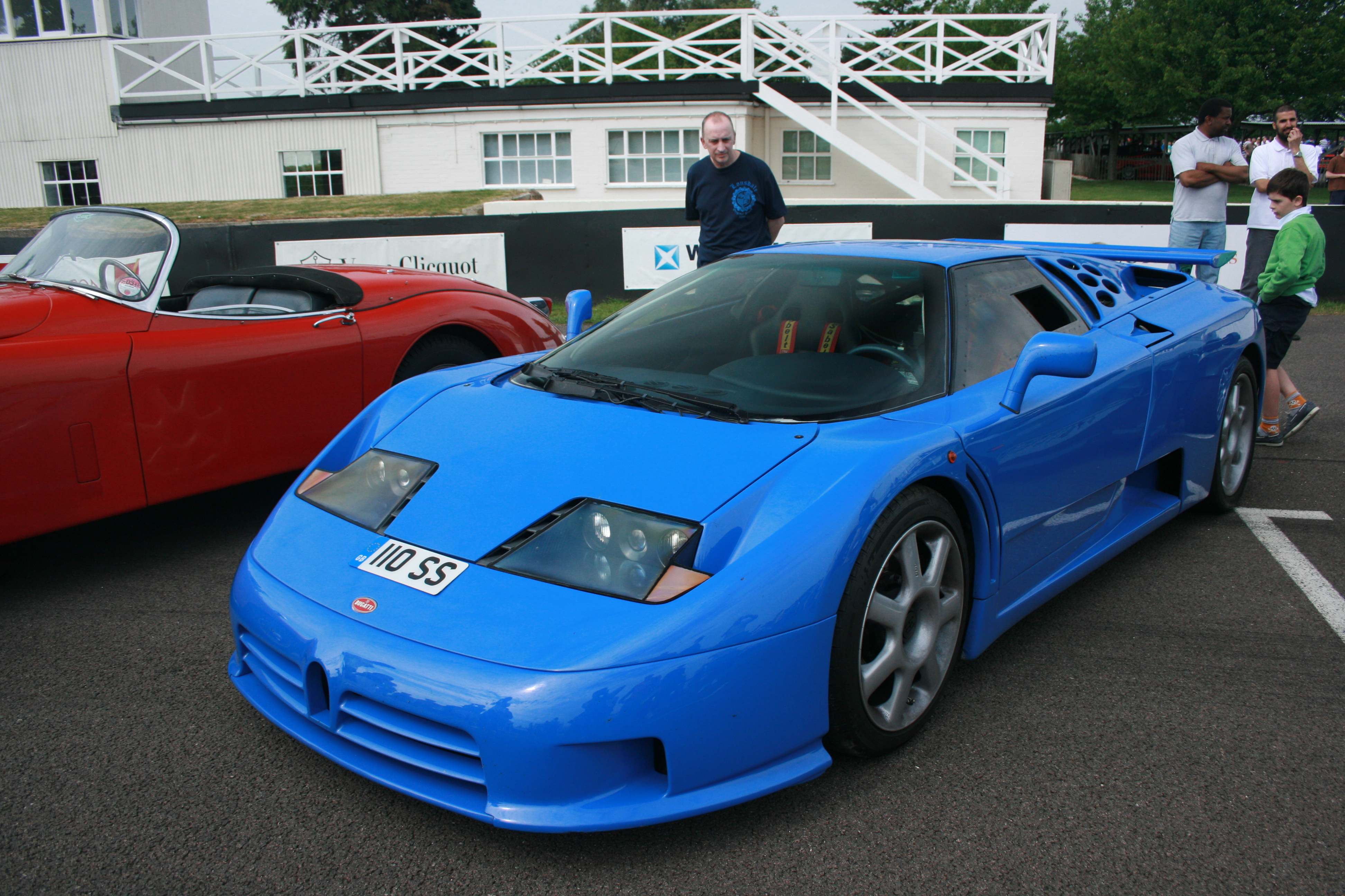 Bugatti EB110